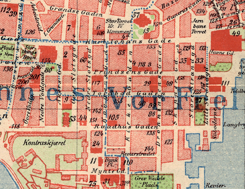 Kvadraturen, Oslo.